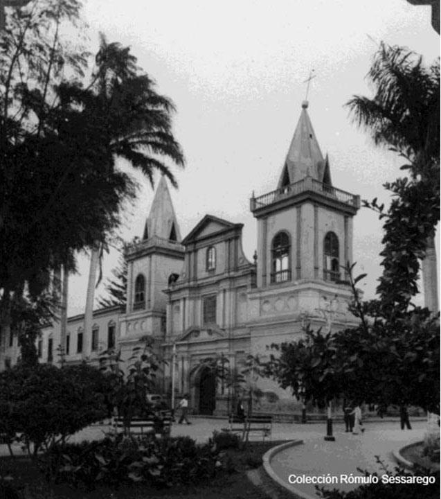 Vista de la desaparecida Iglesia Matriz de Chiclayo y una pequeña parte del Convento Franciscano.